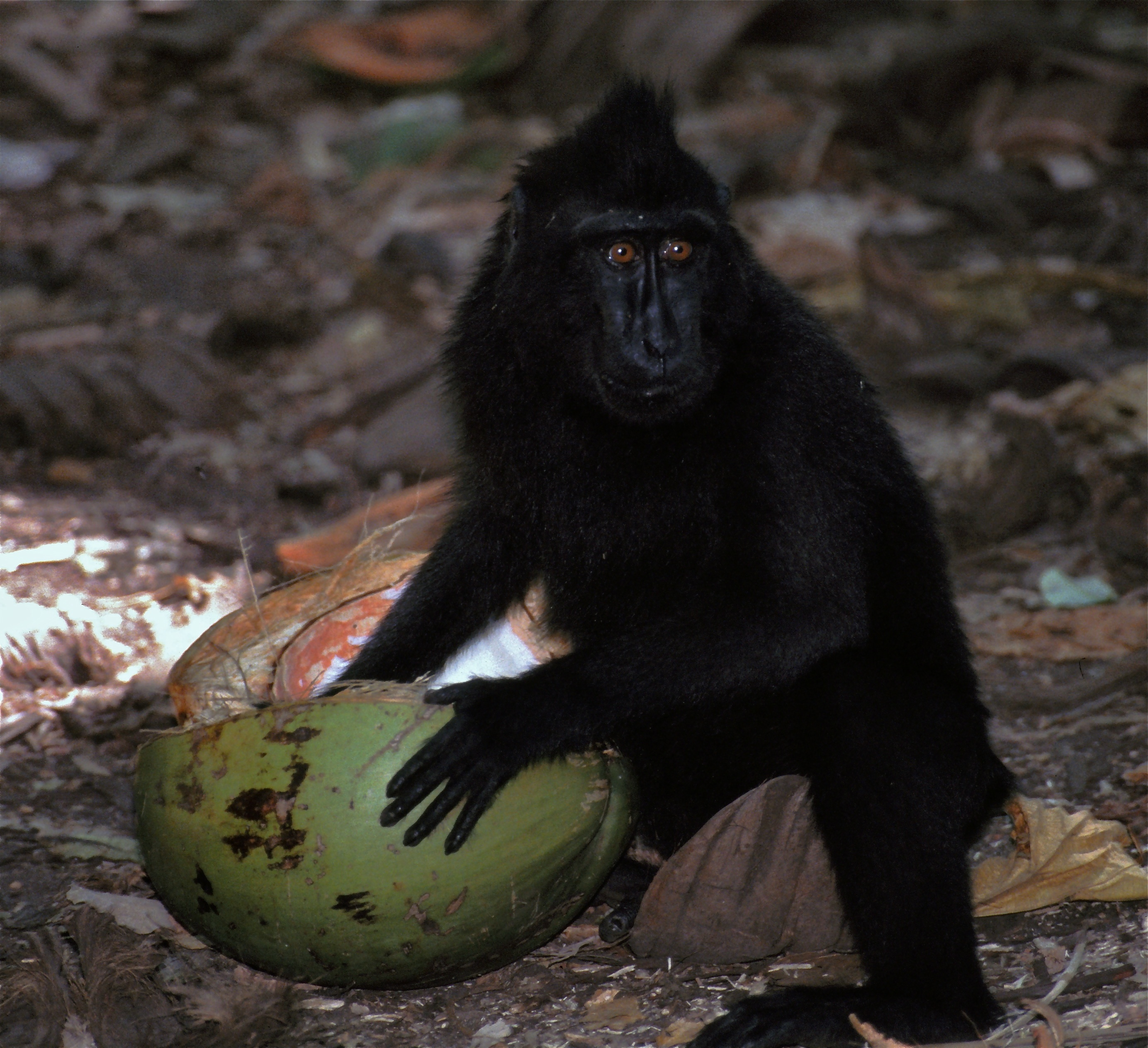 Tangkoko NP, Sulawesi INDONESIA